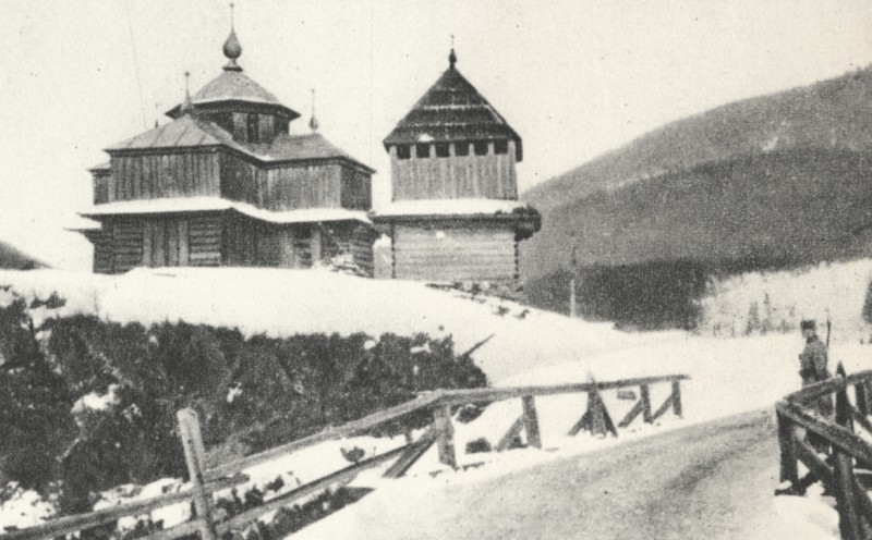 Cerkiew w Rafajłowej.